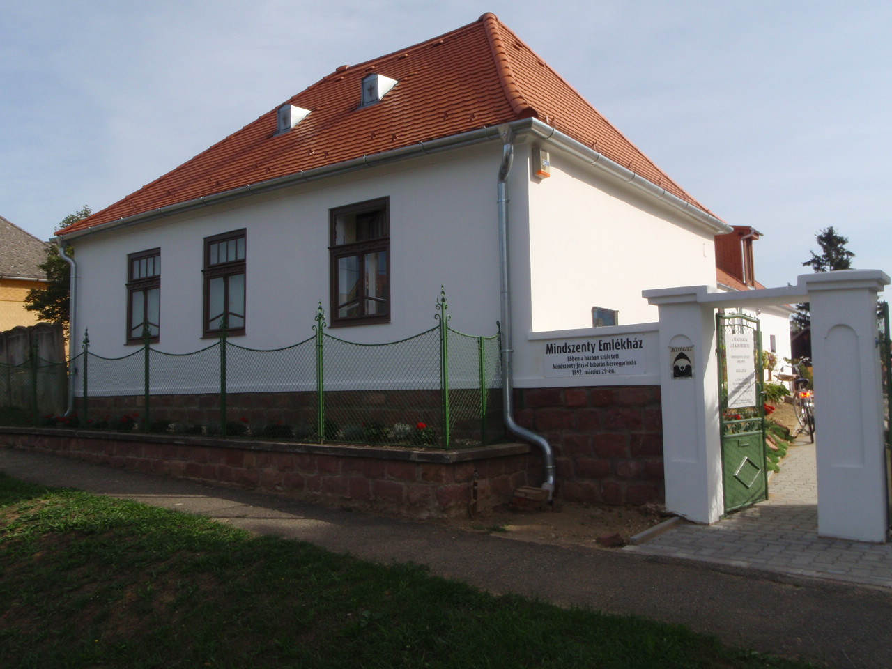 Csehimindszent Mindszenty emlékház, 2015